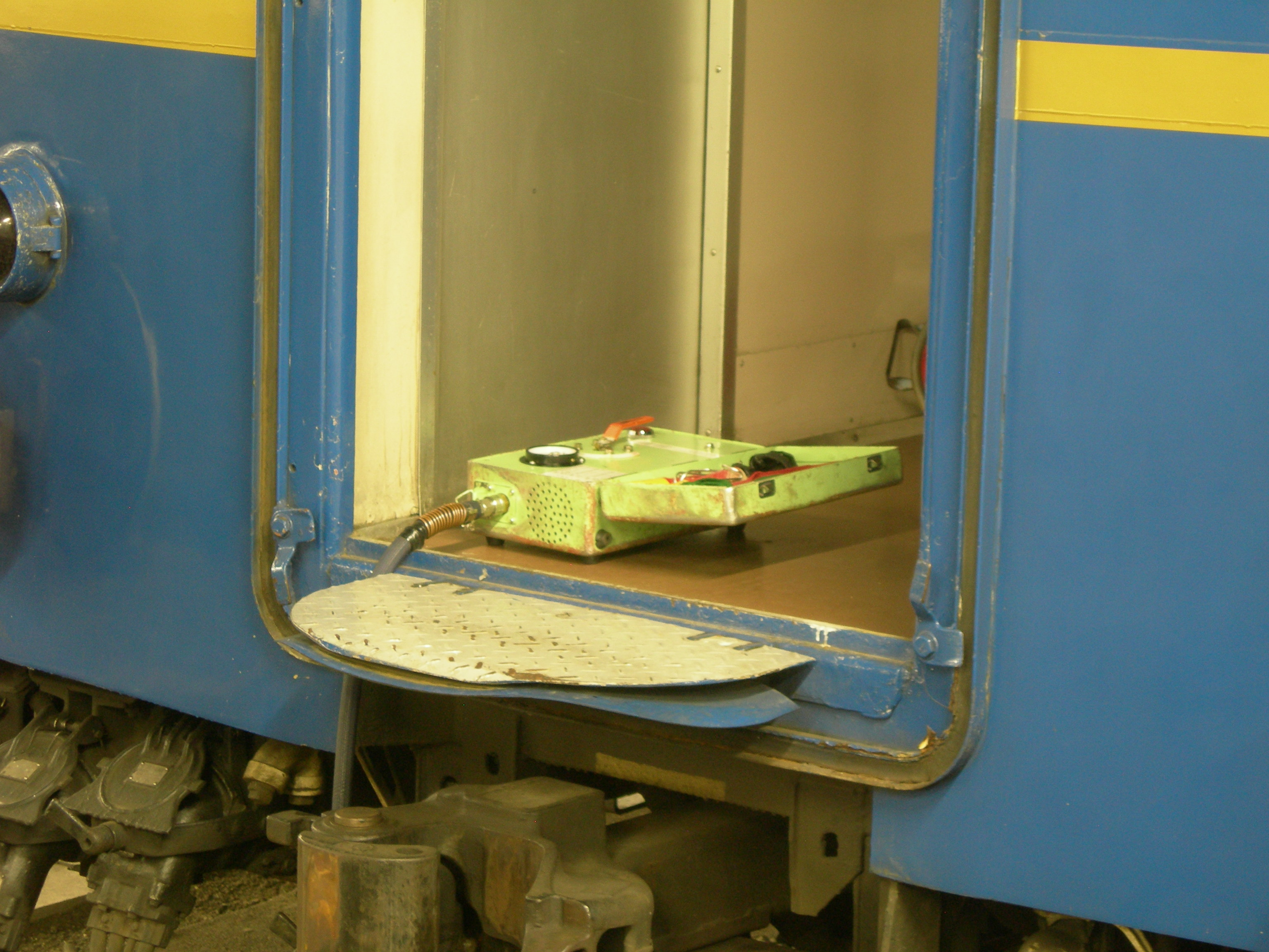 国鉄24系客車最後尾に取り付けた可搬式のブレーキ弁